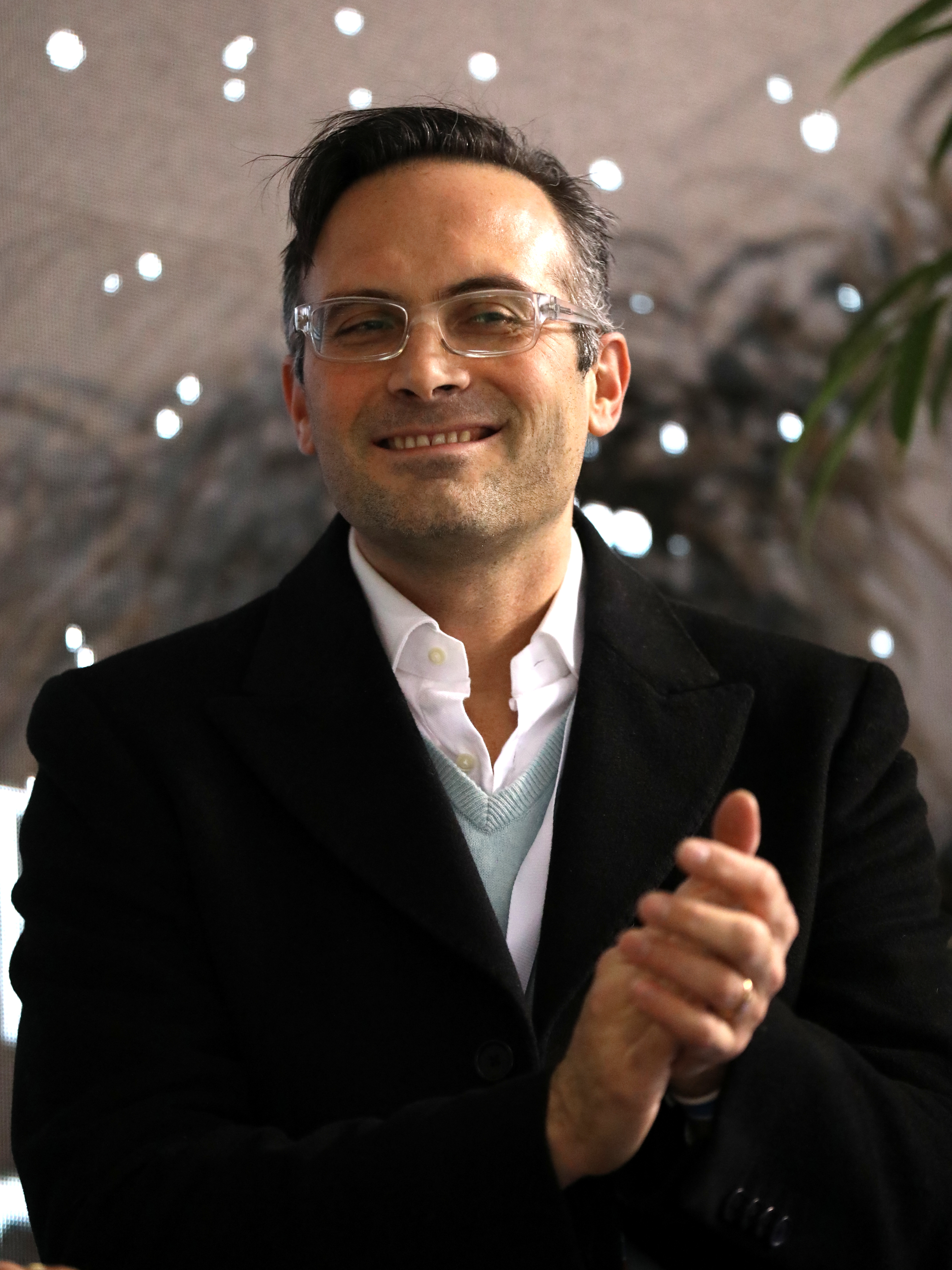 Kiss&cry après le programme de Reed et Ambrulevicius aux Internationaux de France 2019